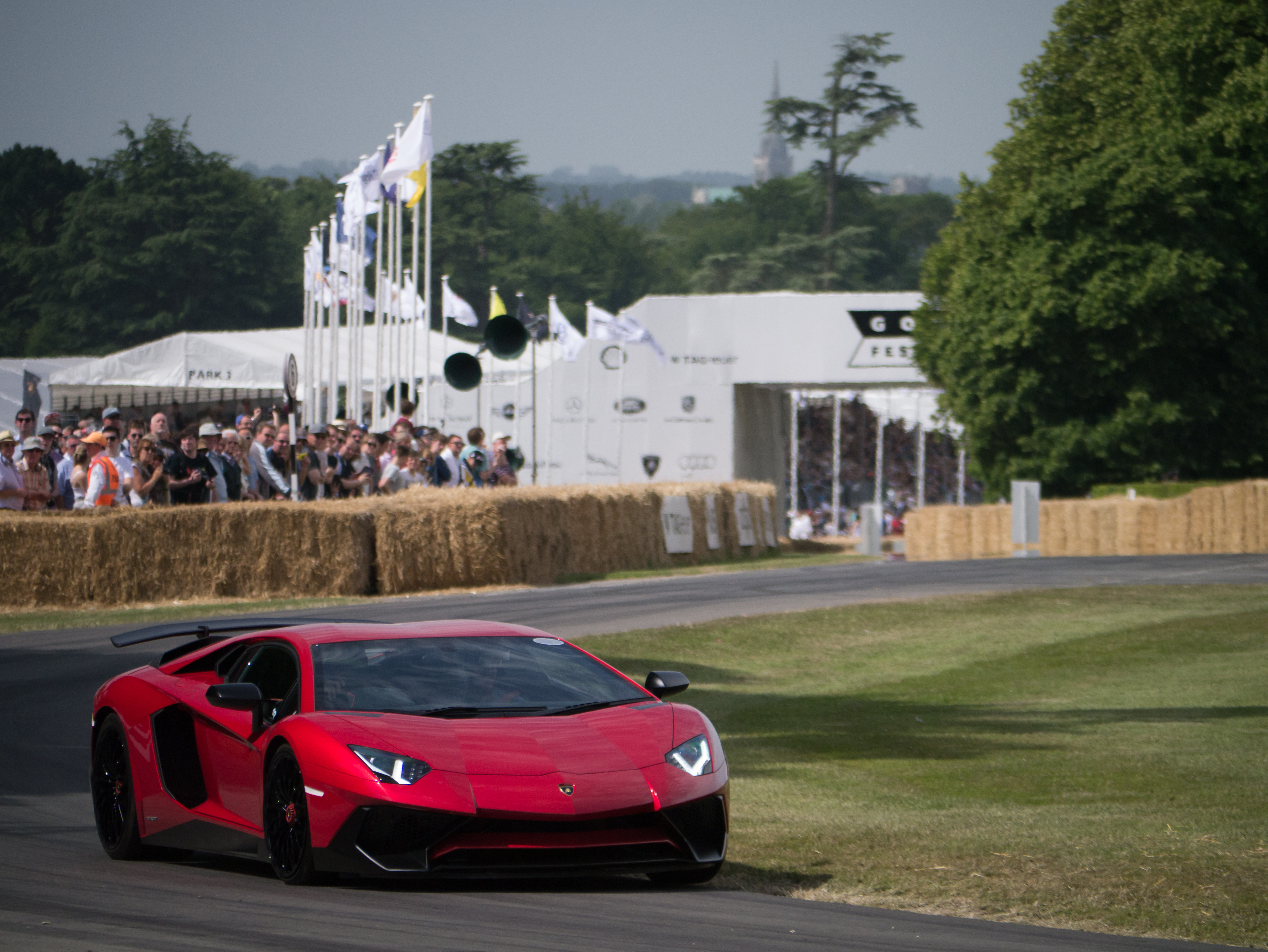 2015 Lamborghini Aventador LP750-4 Super Veloce